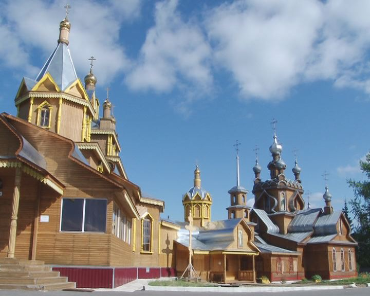 Храм Преподобного Серафима Саровского и Храм Святых жен мироносиц